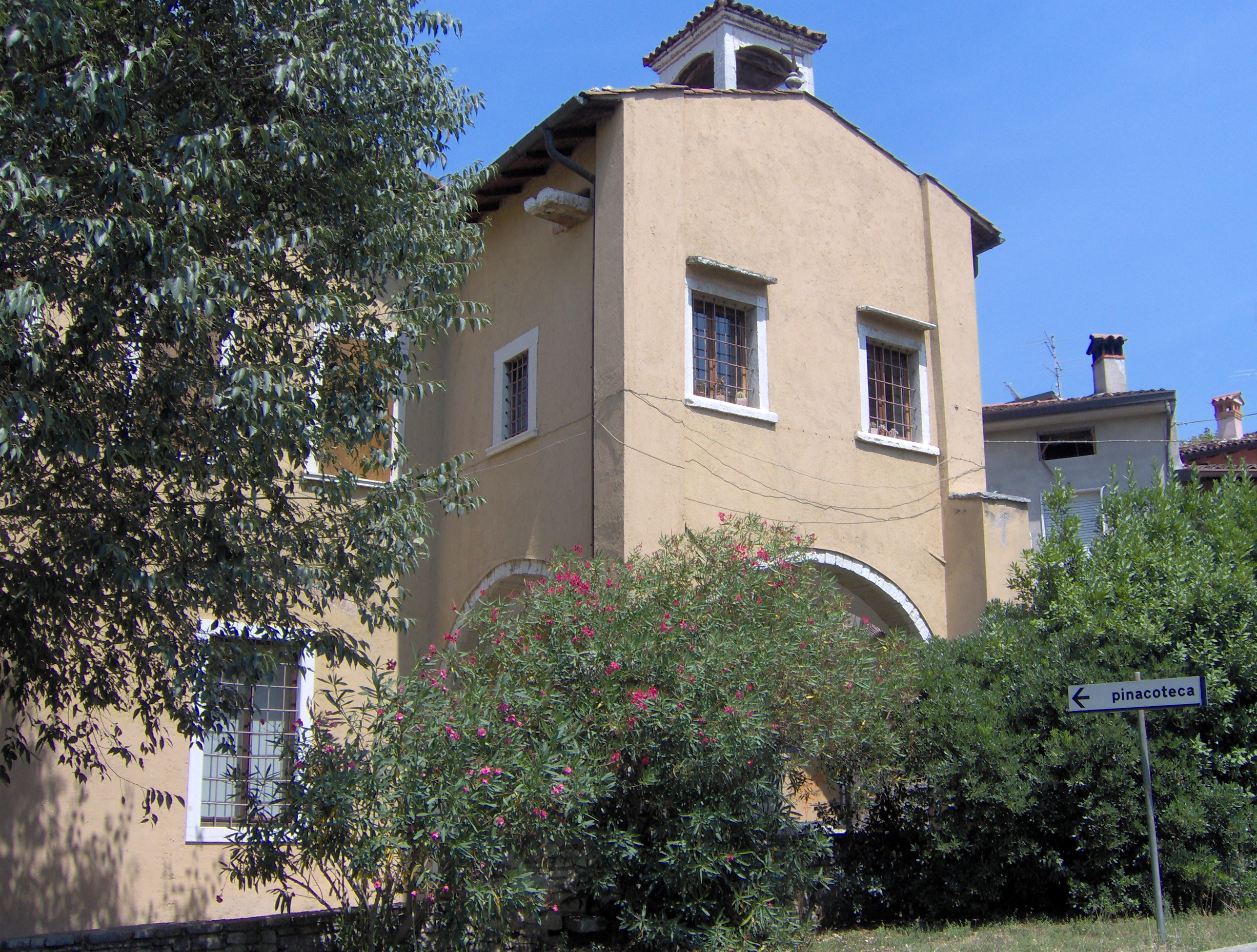 Pinac Rezzato